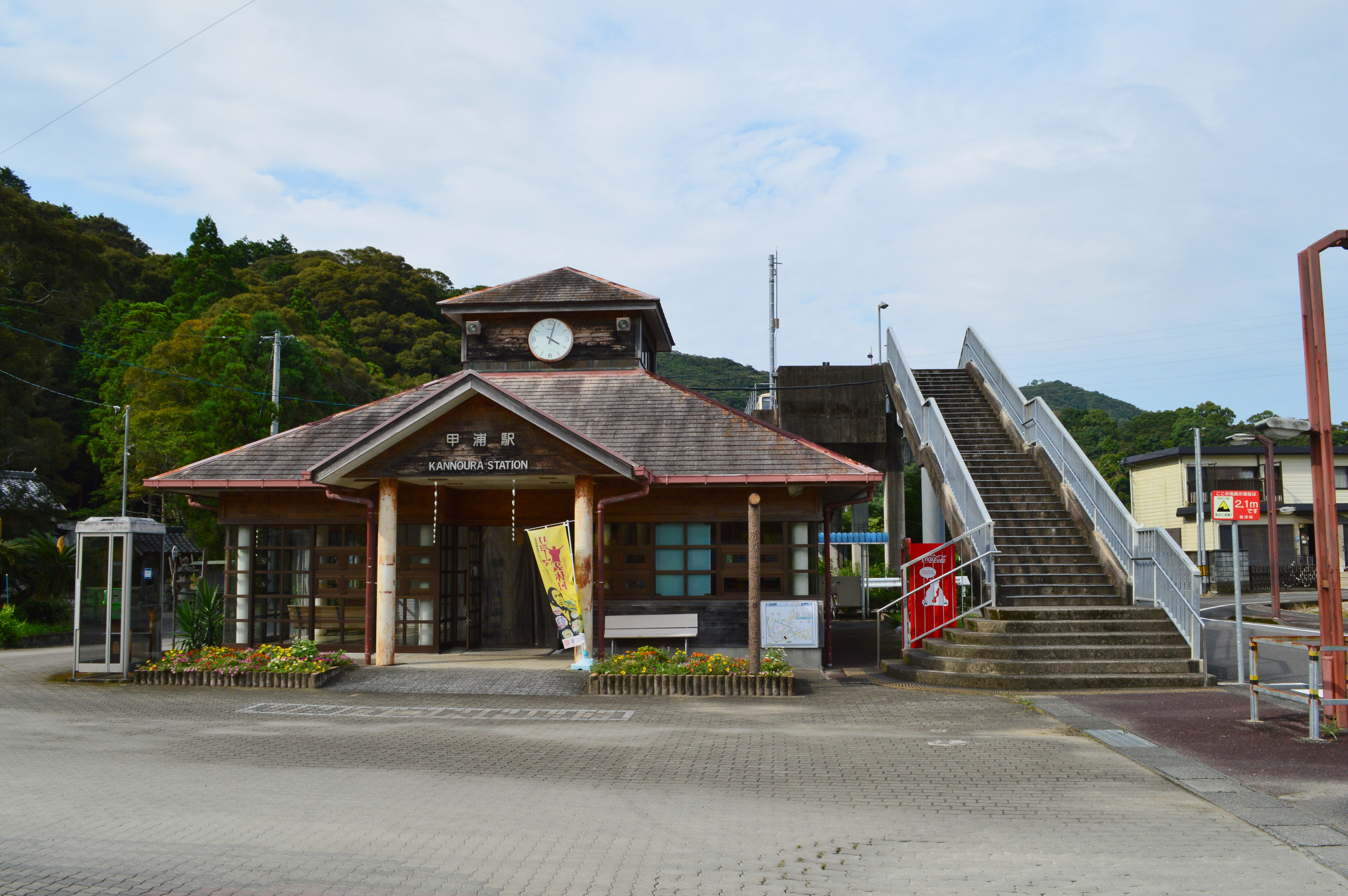 甲浦駅 駅舎